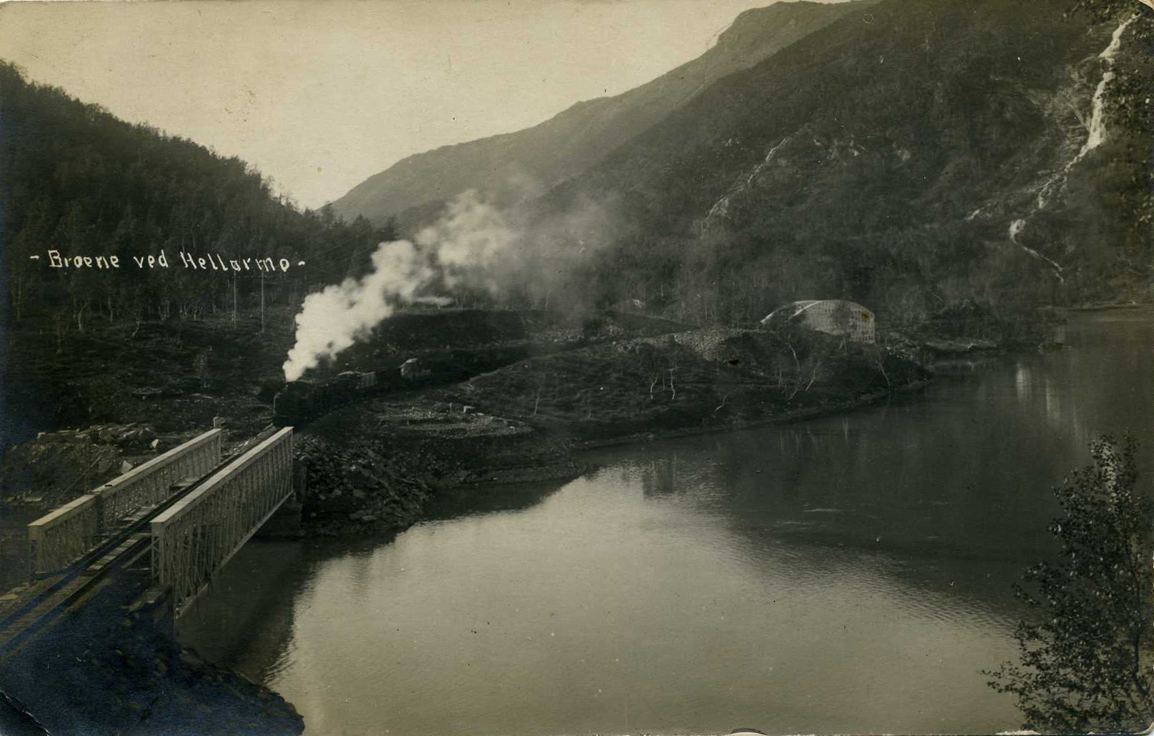 Sulitjelma banen Norwegian wikipedia English wikipedia